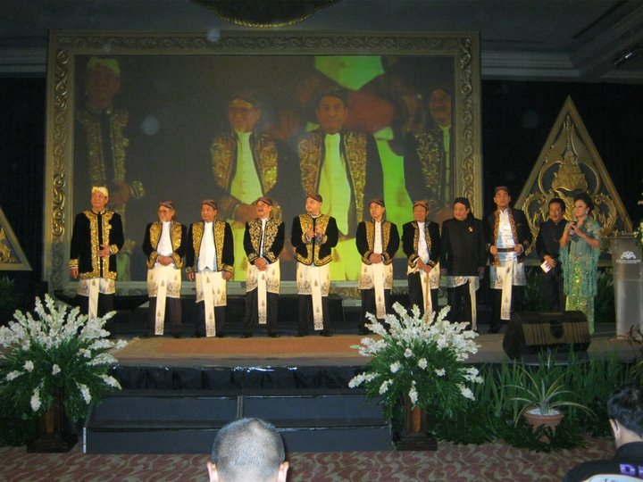 Putra-putra Wiranatakusumah V